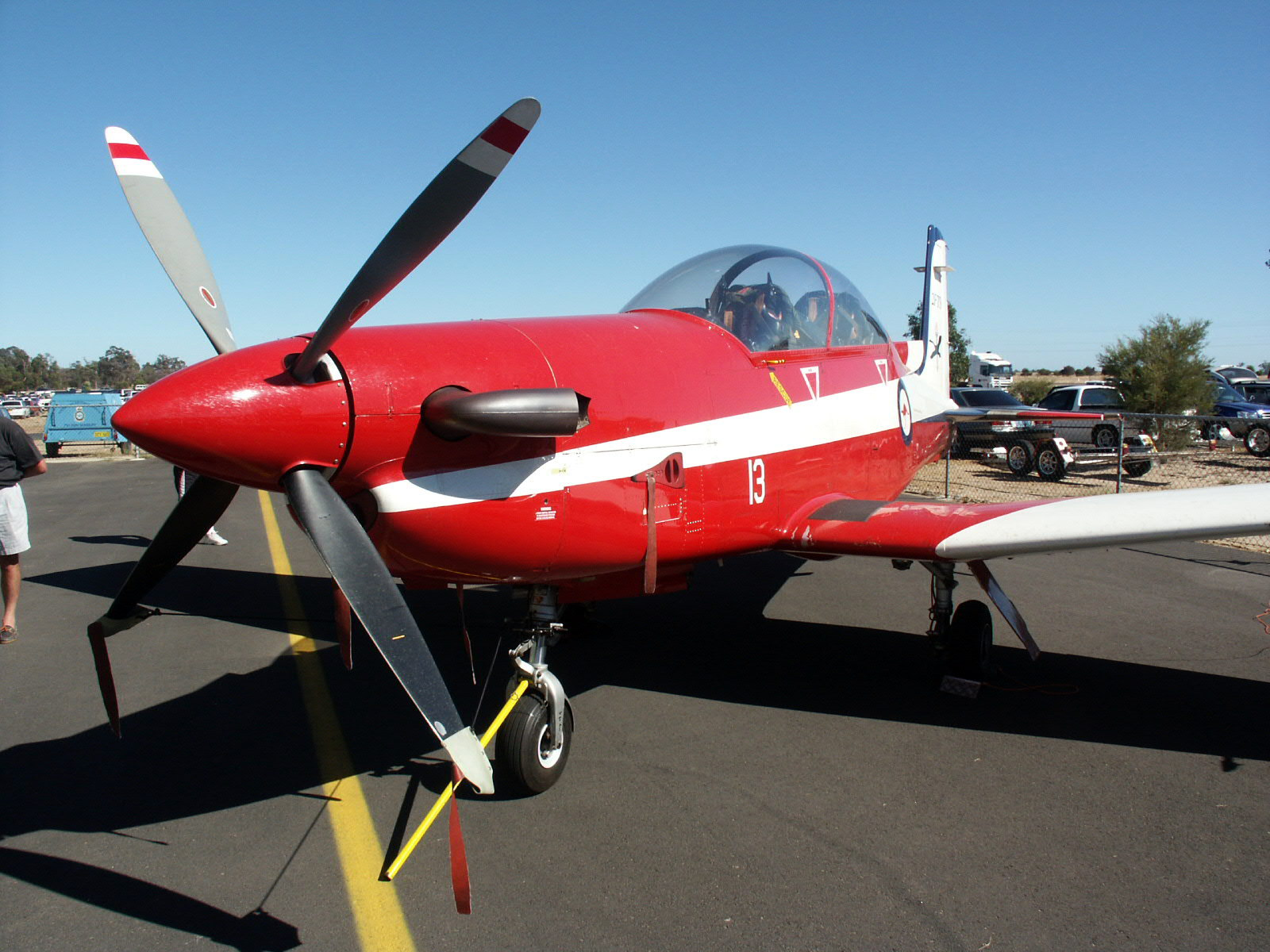 RAAF Pilatus PC-9 A23-013.